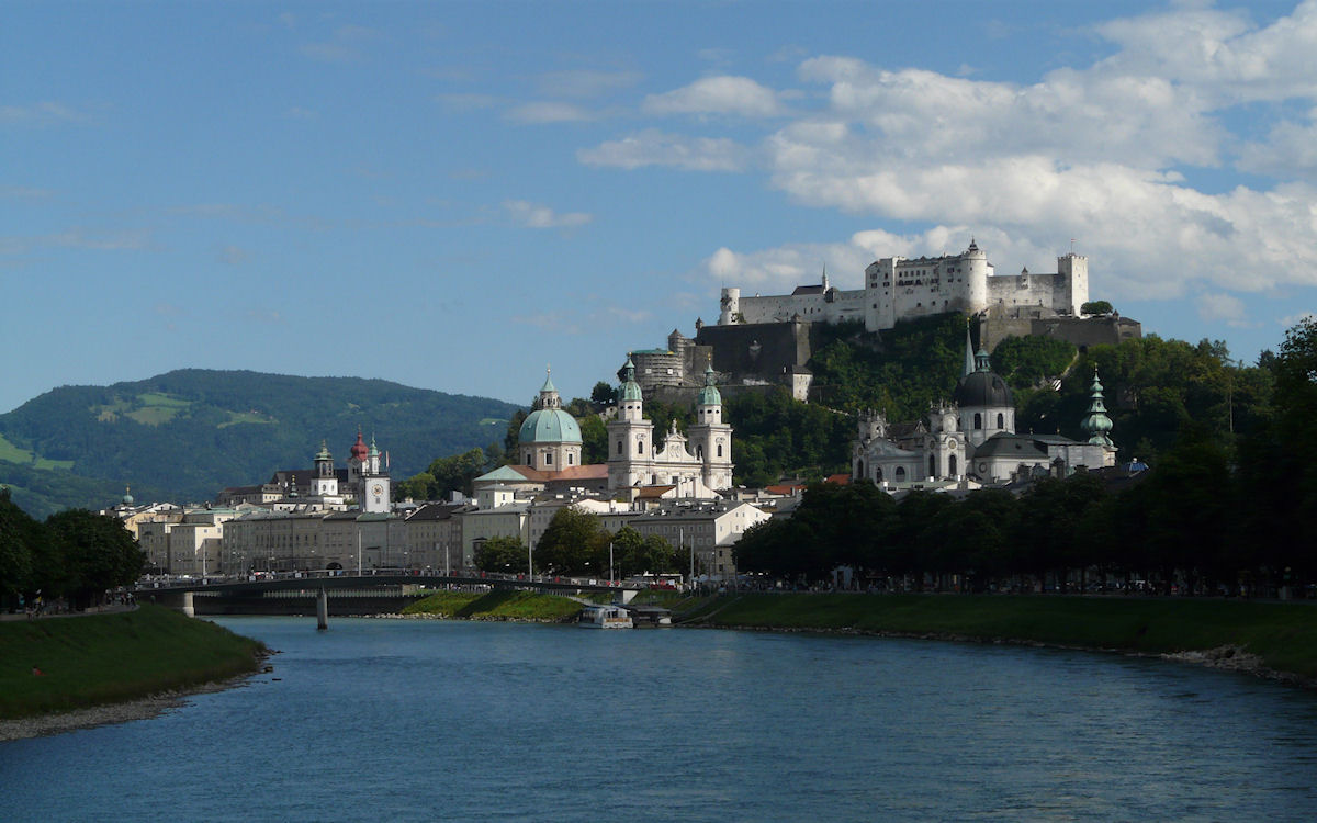 Salzburg, Austria